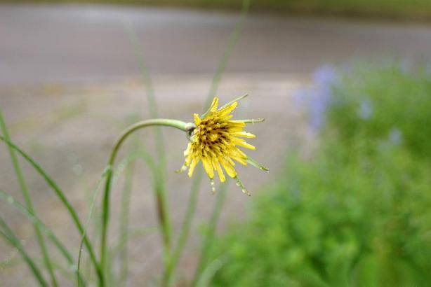 Tragopogon pratensis